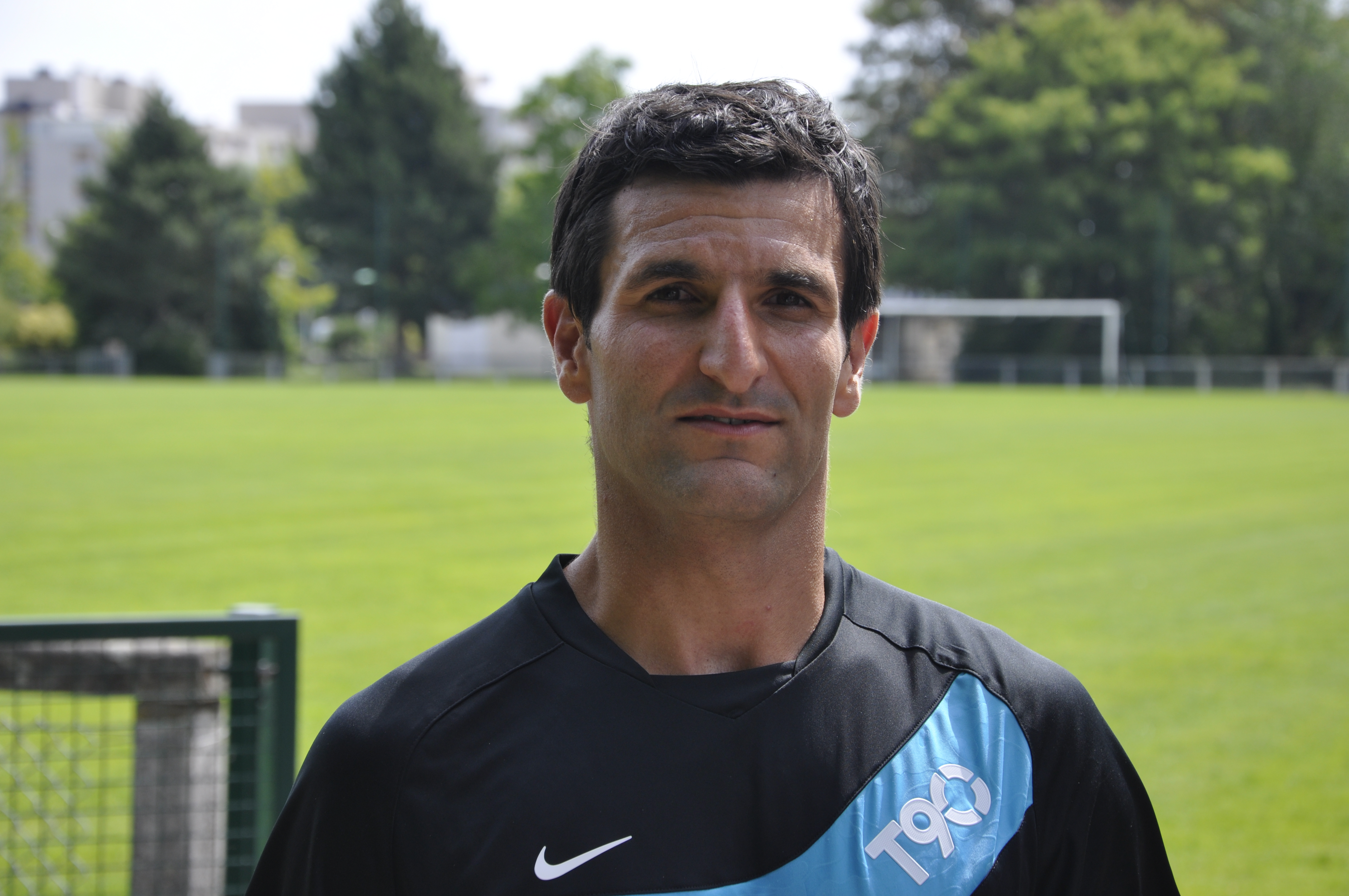 Pierre-Alain Frau à l'entrainement à Caen le 27 juin 2011